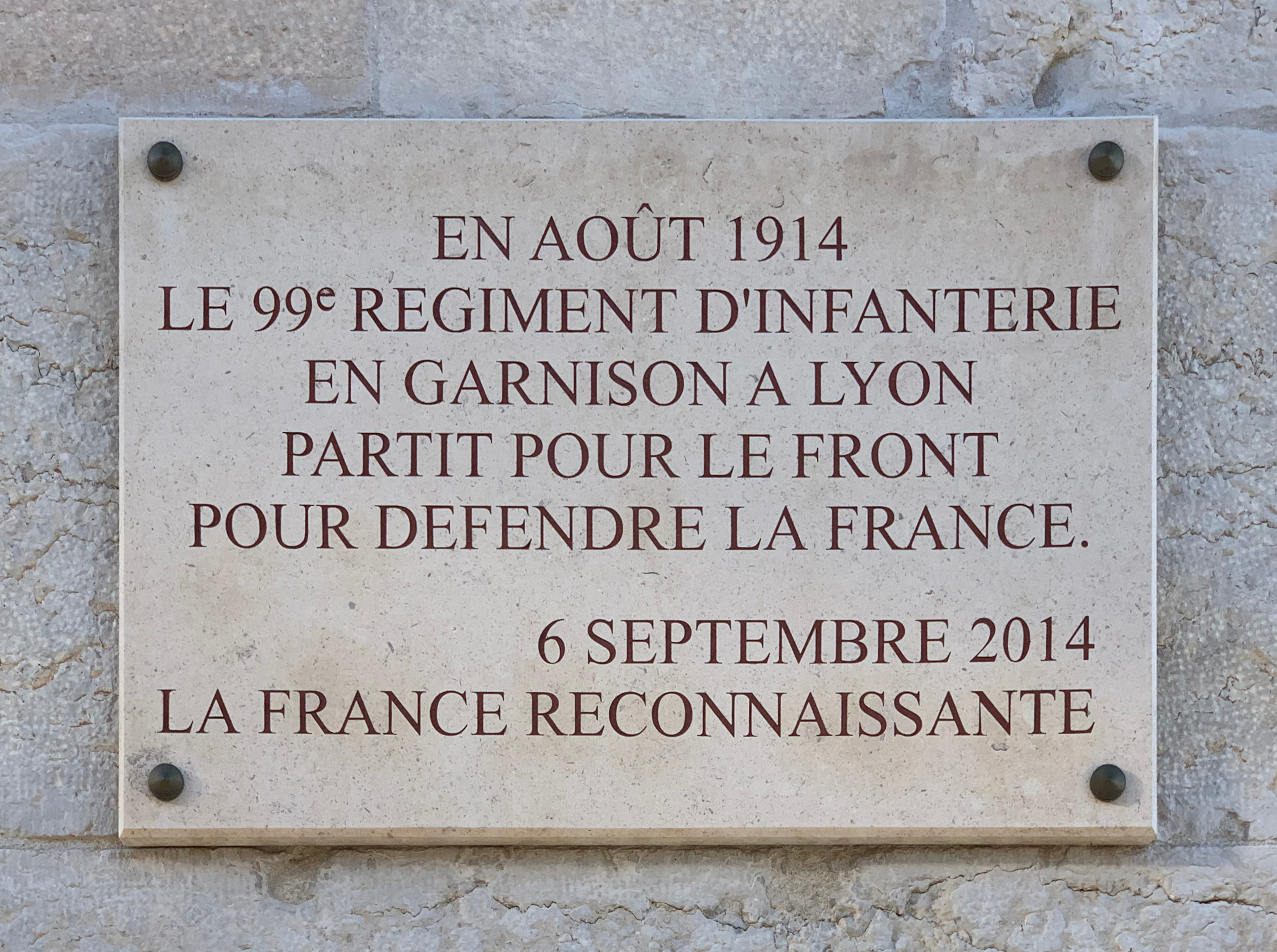 Plaque à l'entrée du Parc Blandan. recto in engraving: EN AOUT 1914 LE 99E REGIMENT D'INFANTERIE EN GARNISON A LYON PARTIT POUR LE FRONT POUR DEFENDRE LA FRANCE 6 SEPTEMBRE 2014 LA FRANCE RECONNAISSANTE